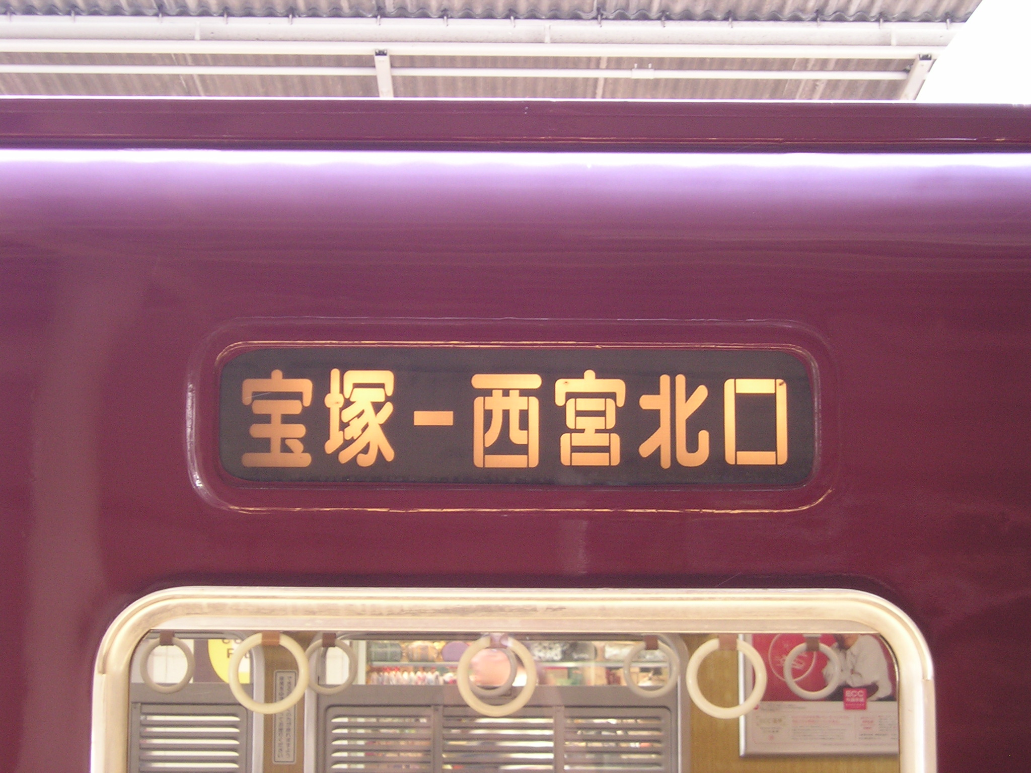 一部の方向幕未改造車は列車種別表示灯に行先を表示しています 2009.8.23 西宮北口にて